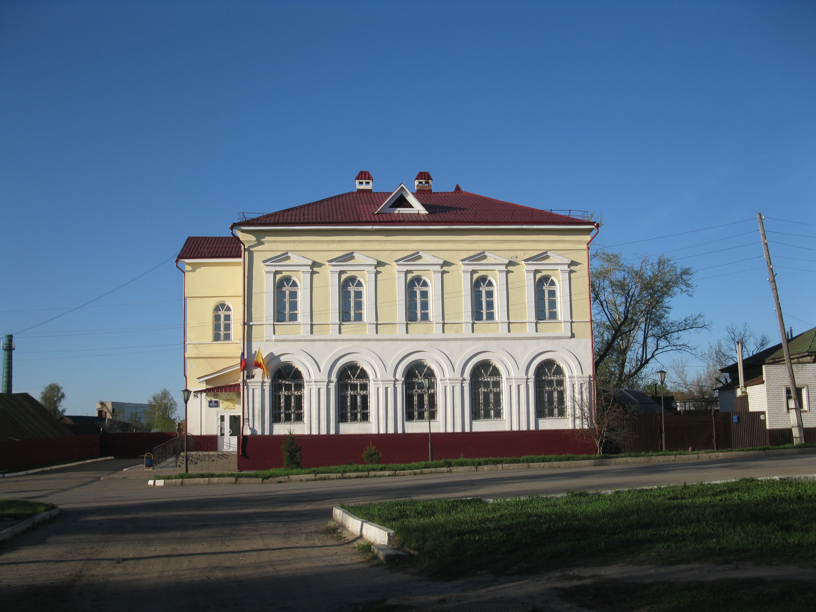 Дом жилой: улица Горшенина, 30, Алатырь, Чувашия